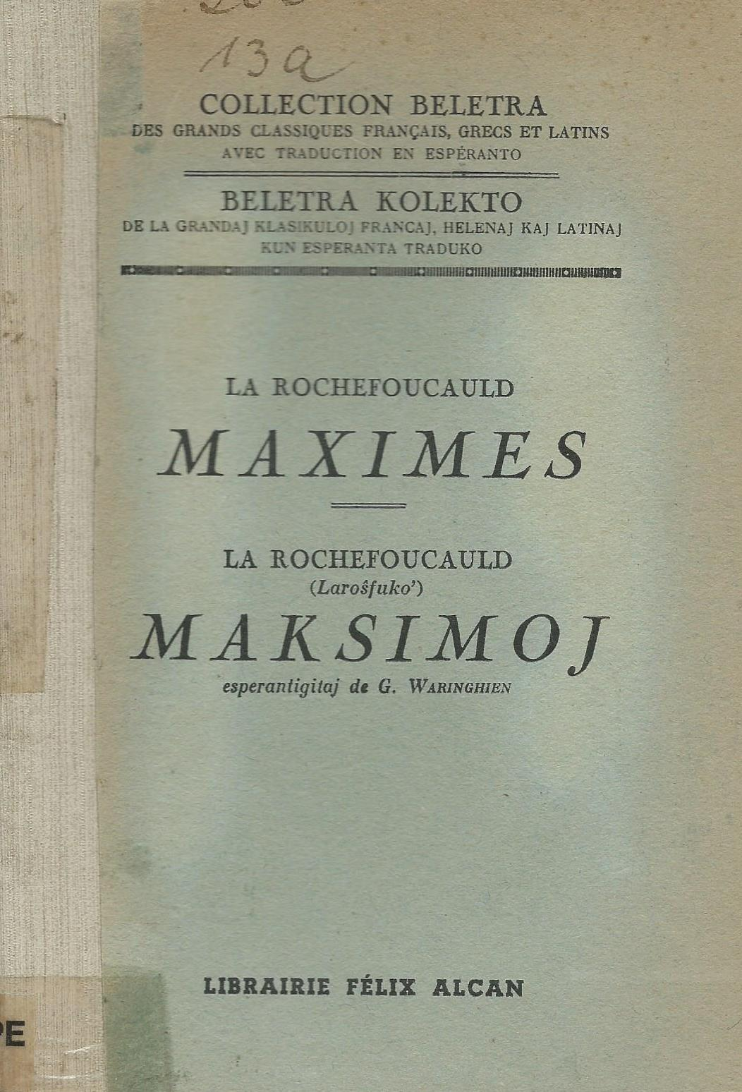 librokovrilo de "Maksimoj", 1935